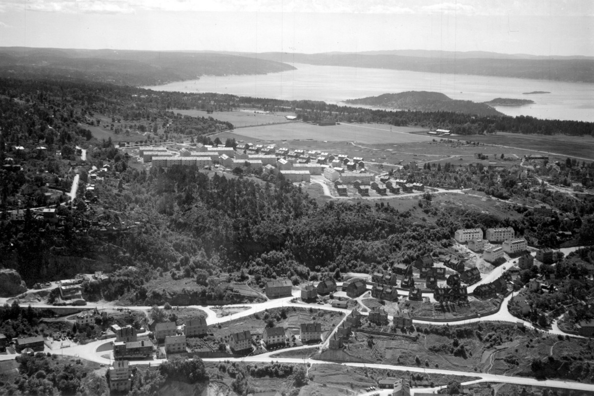 Deler av Ekebergskrenten fotografert fra nord.